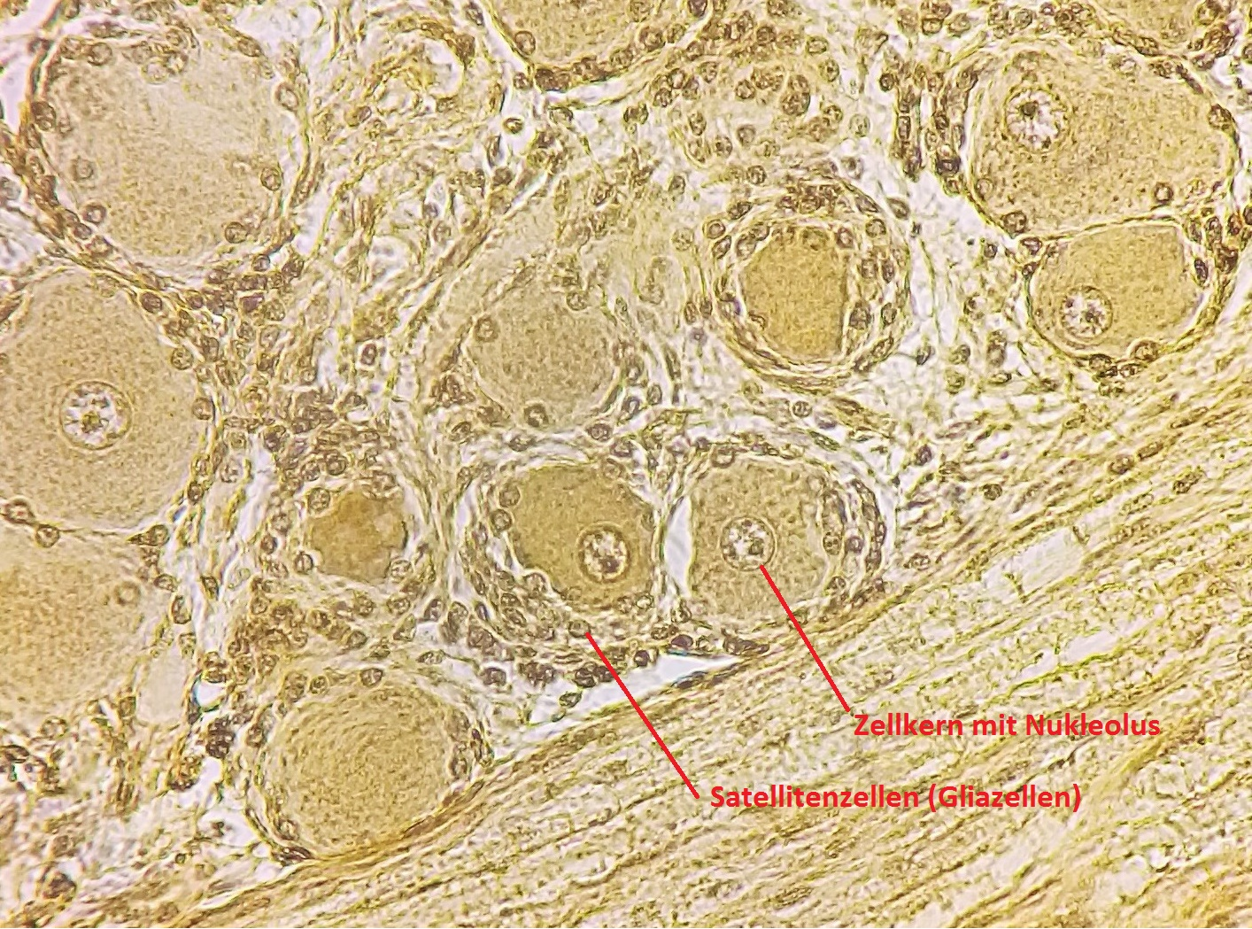 Histologische Aunahme eines menschlichen Spinalganglions